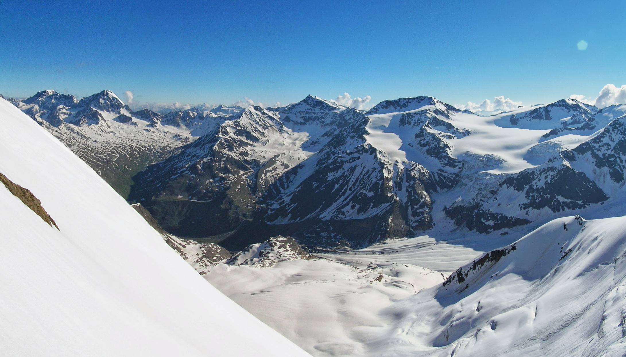 Gran Zebru - Cevedale - Palon de la Mare da passo Dosegù 23 giugno 2013